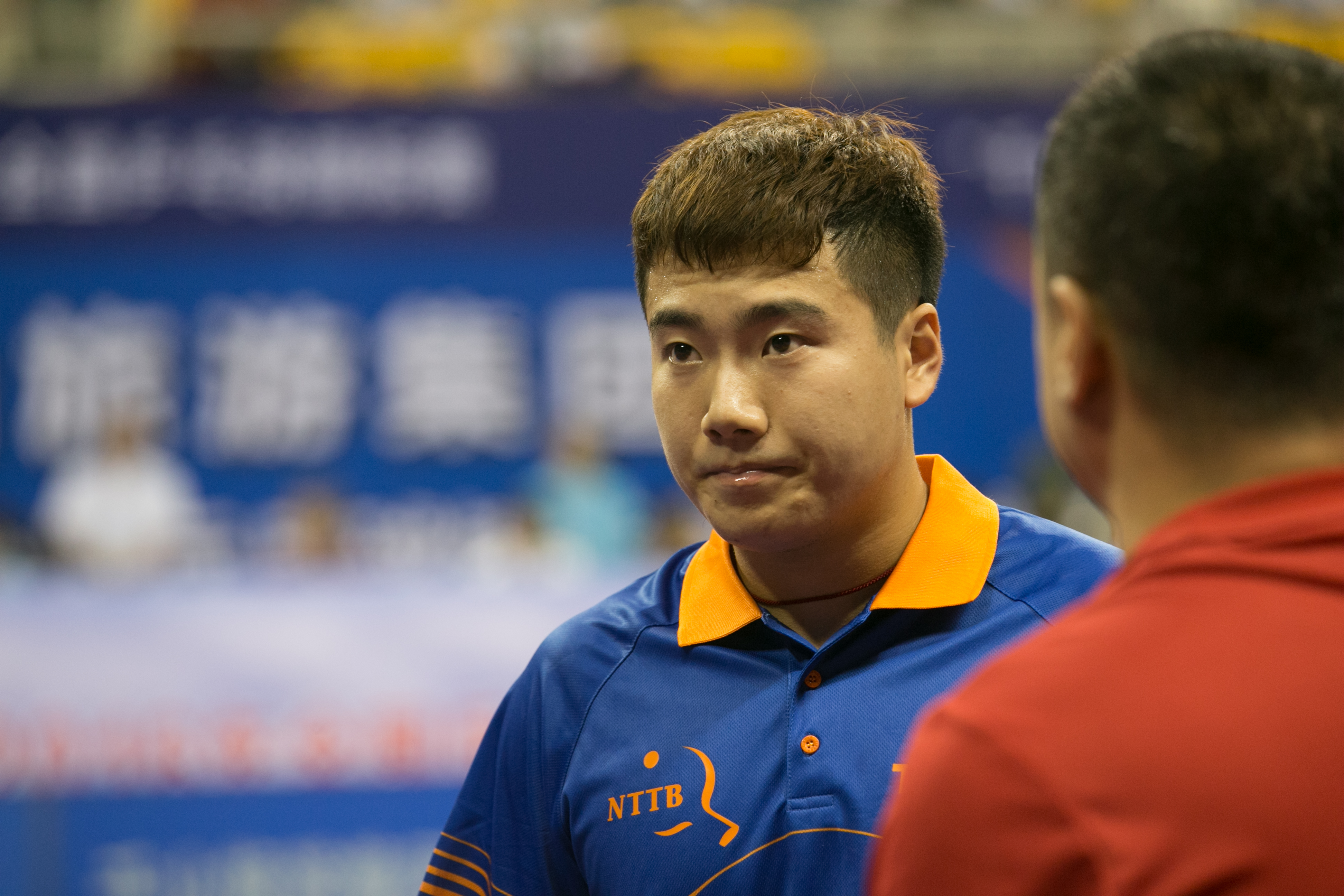 _K0K3462